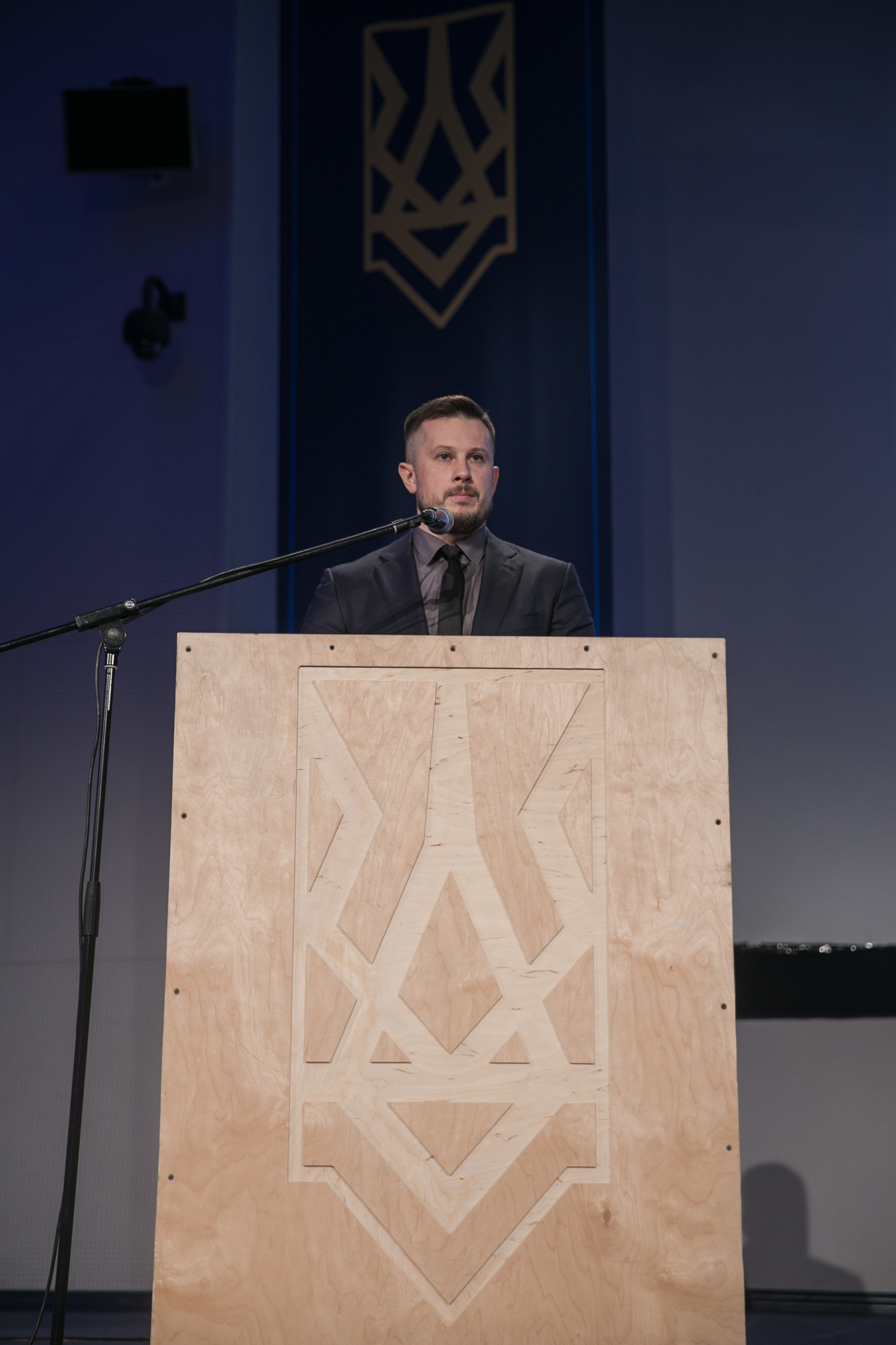 Андрій Білецький на другому з'їзді партії Національний Корпус 14.10.2017